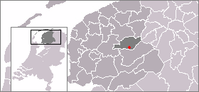 Locatie van Boornbergum, zelf gemaakt uit sjabloon van Wikipedia-gebruiker Mtcv